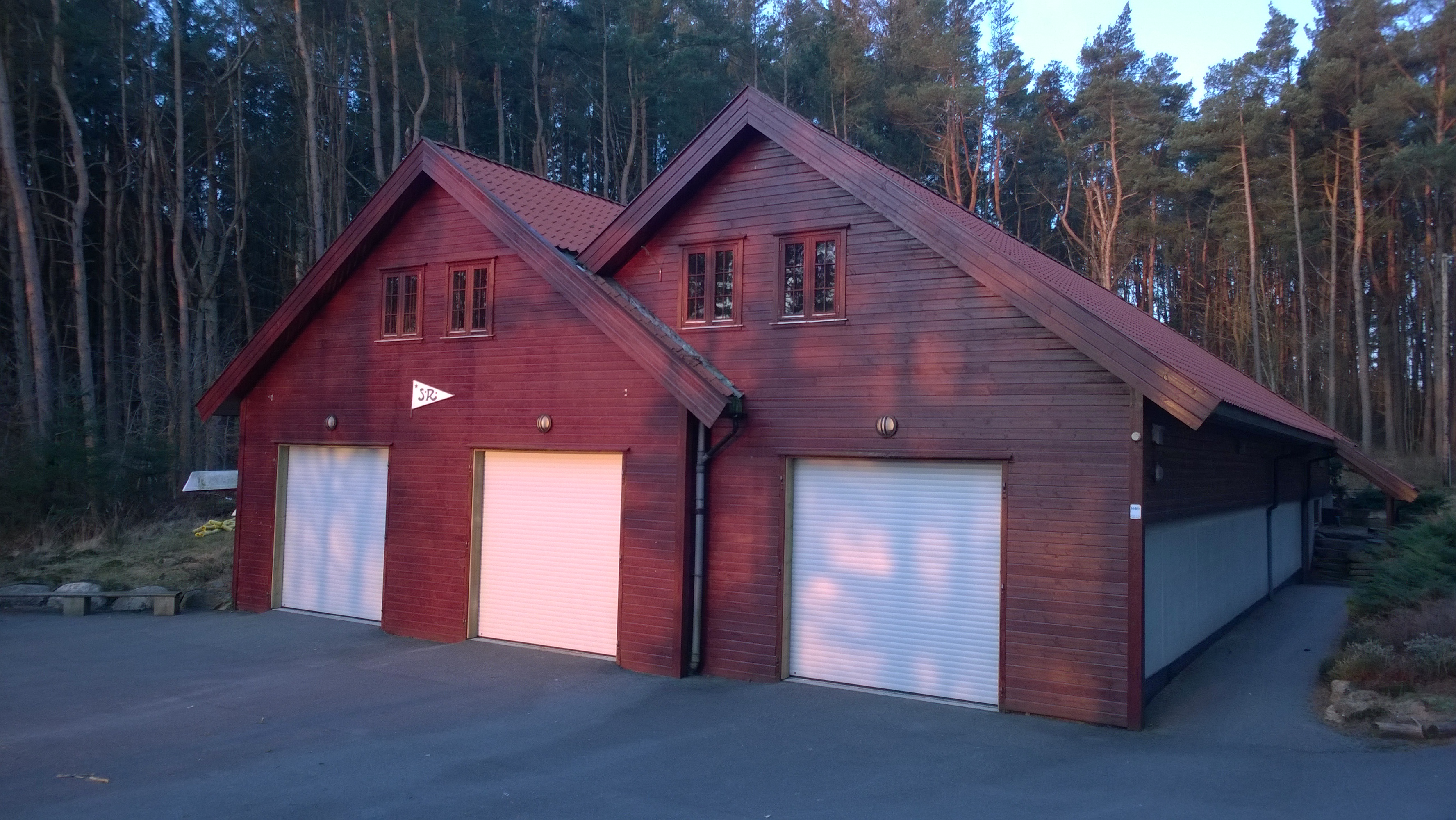 Stavanger Roklubs klubbhus ved Stokkavatnet.